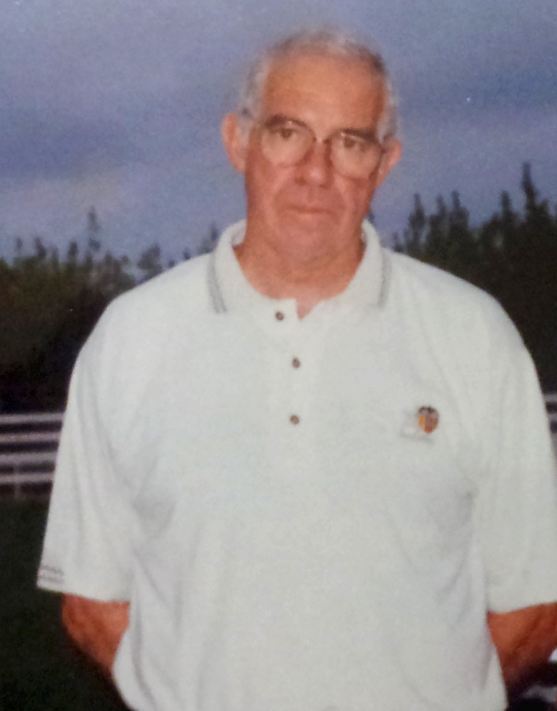 Luis Aragonés com a entrenador del València CF.